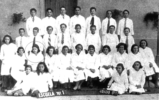 Eva Perón. Foto escolar. 5to. Grado. Junín. 1933. Eva se encuentra sentada a la izquierda (señalada)